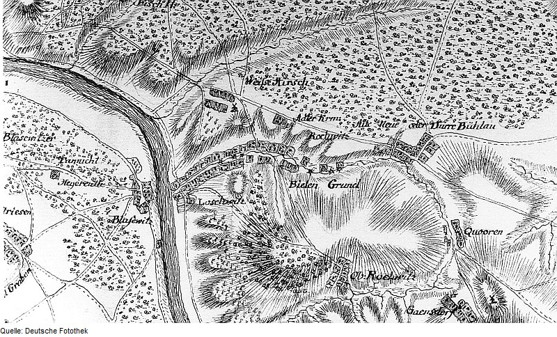 Original image description from the Deutsche Fotothek Dresden-Weißer Hirsch. Ausschnitt aus: Karte von einem Teil des Kurfürstentums Sachsen, Petri, nach 1759 (Sign.: VII 63)